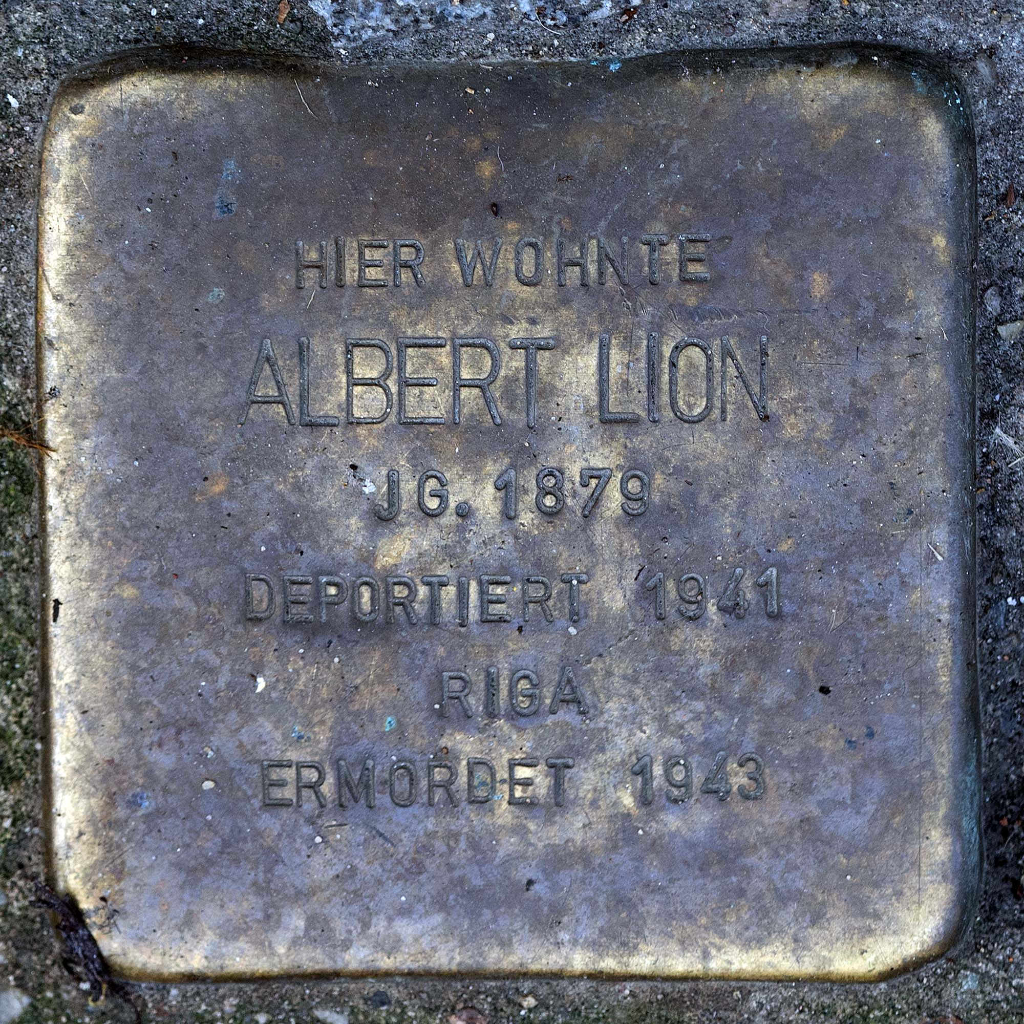 Stolperstein für Lion Albert